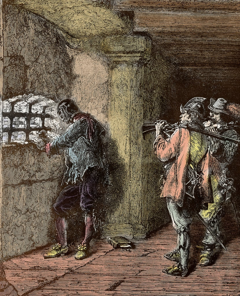 l'Homme de la Masque de fer par de neuville